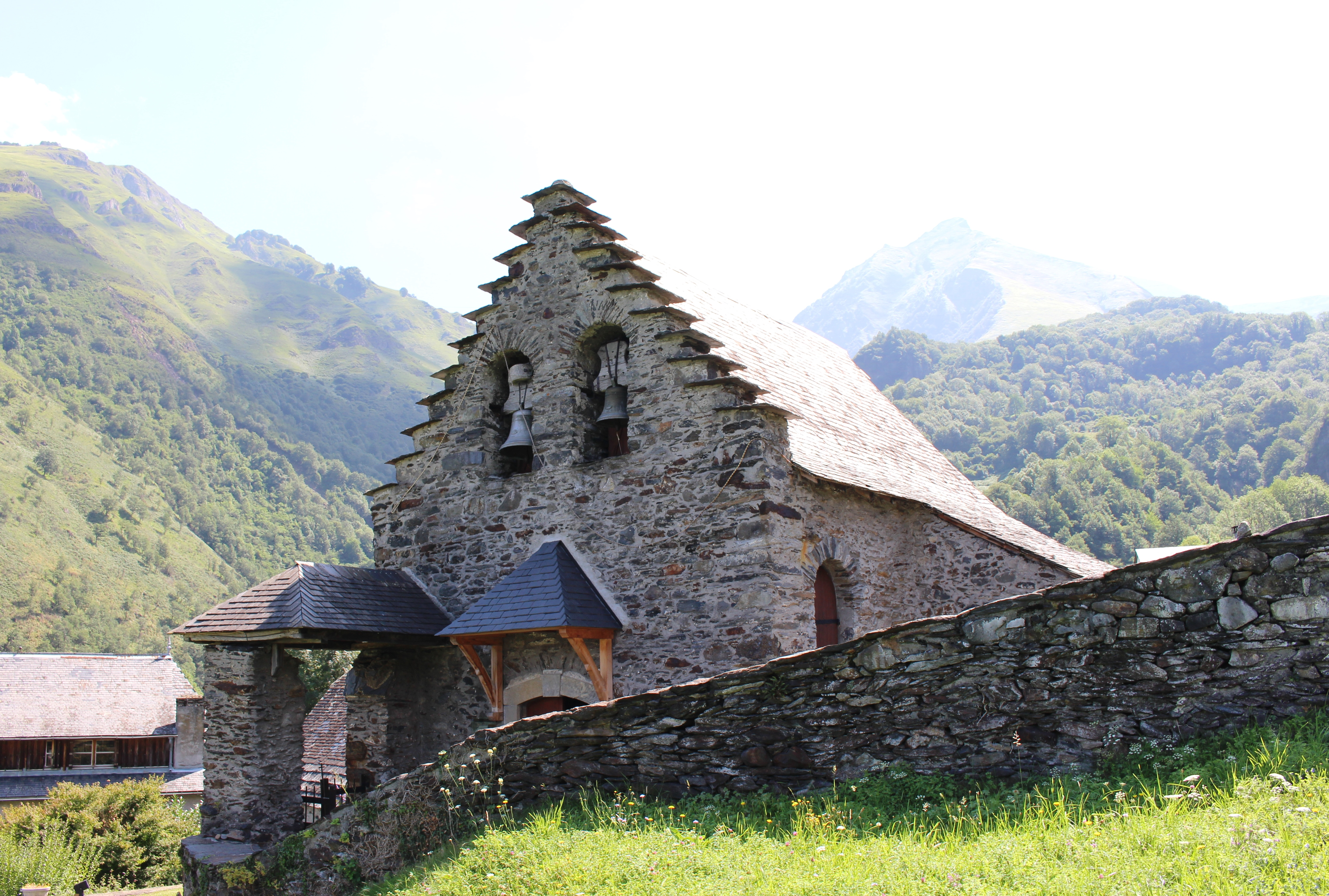 Chapelle Sainte-Catherine d'Ortiac (Hautes-Pyrénées)